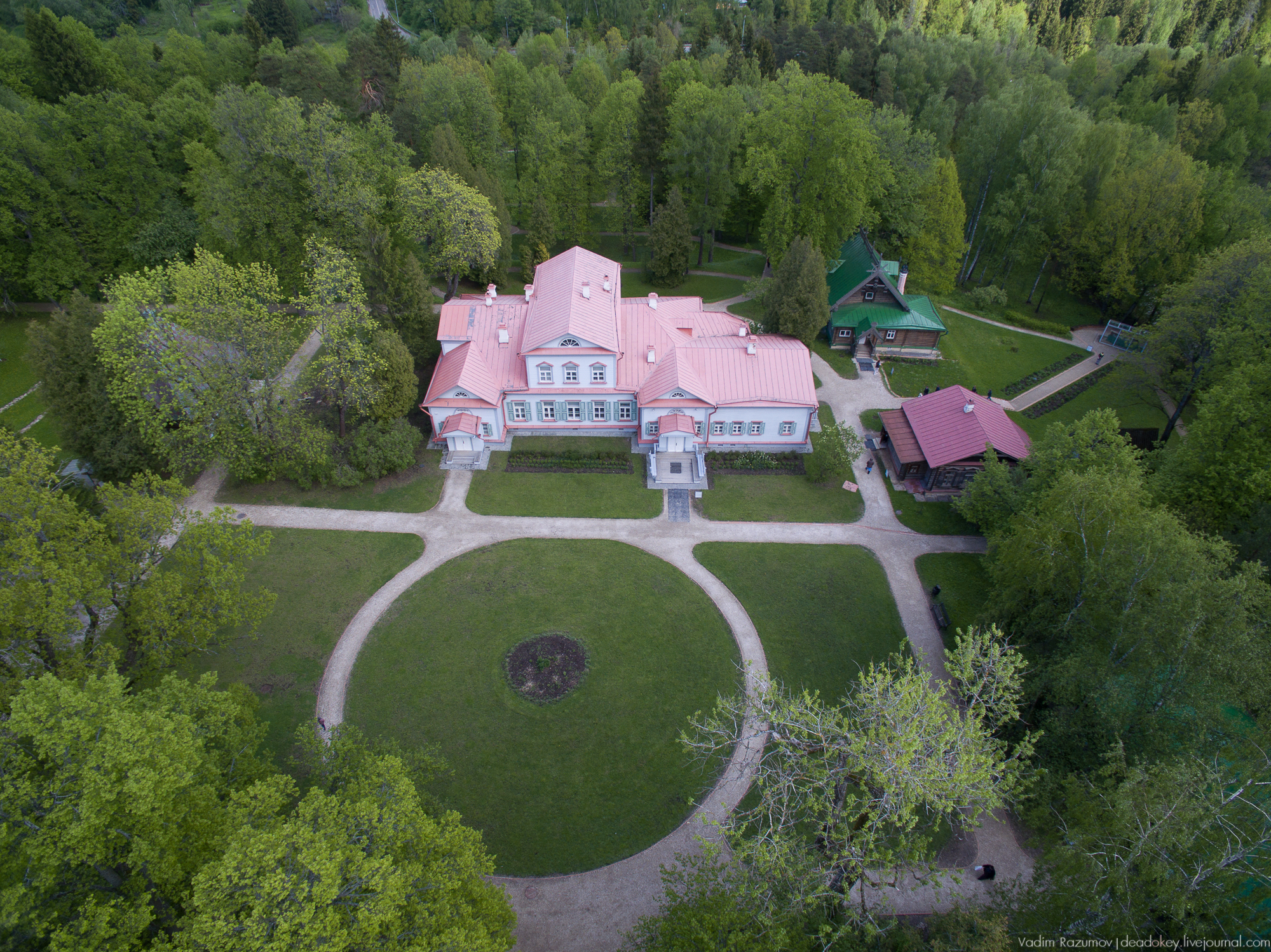 Абрамцево